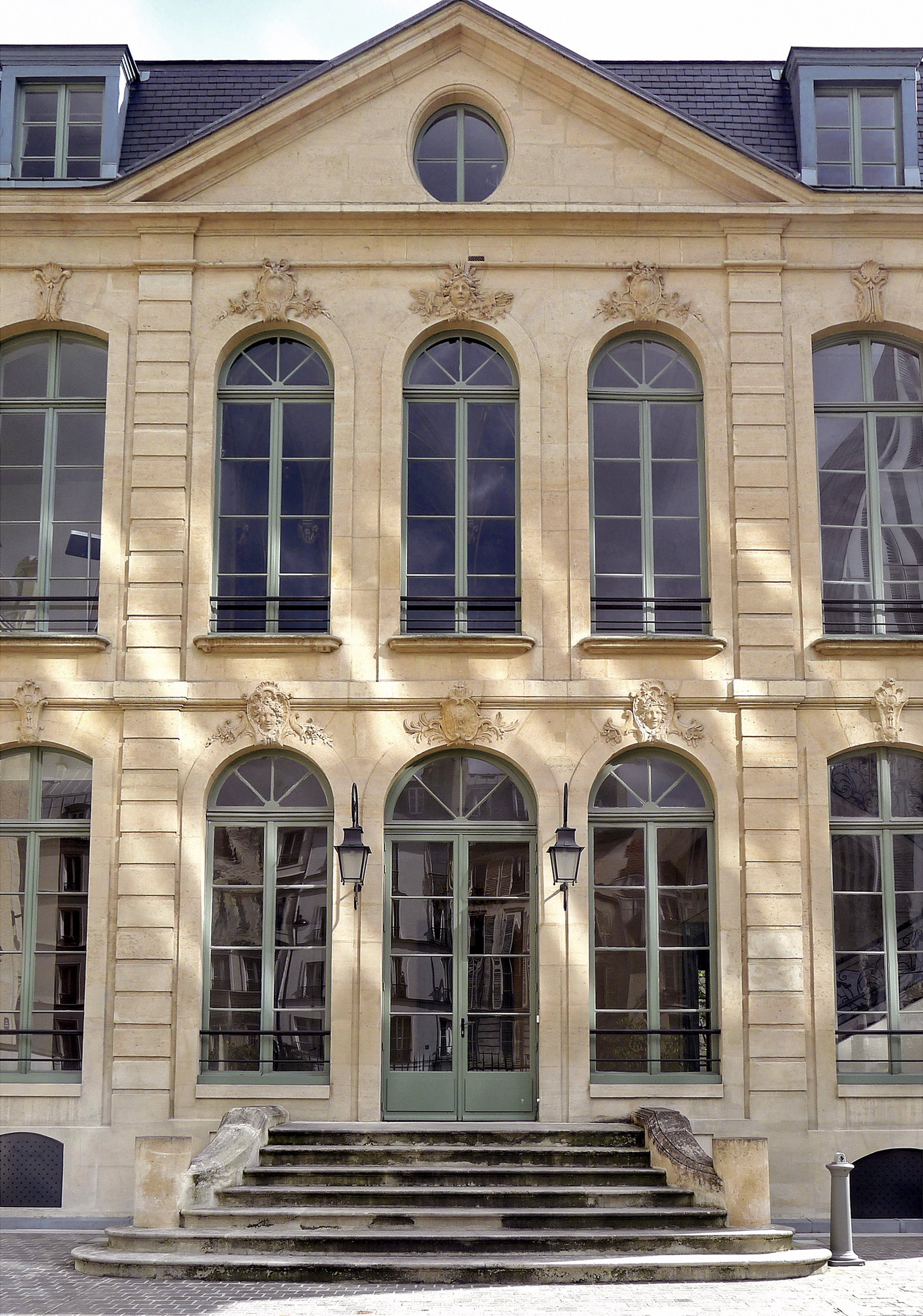 Hôtel de Choiseul-Praslin au n°111 rue de Sèvres - Paris VI .